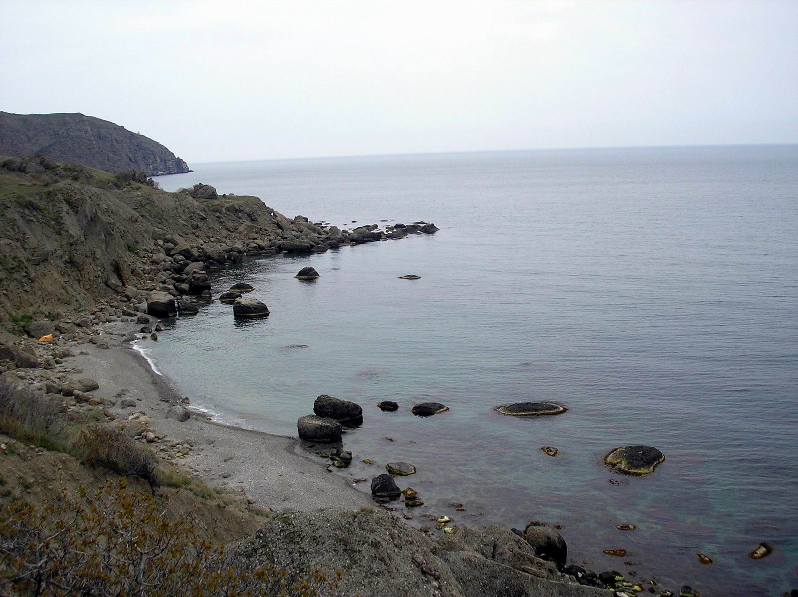 Мис Меганом, Крим